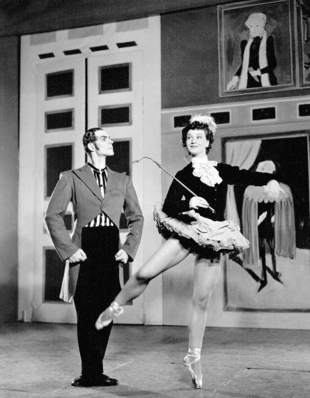 Margaretha von Bahr i titelrollen i Fröken Julie tillsammans med Klaus Salin på Finlands nationalbalett 1952.